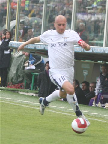 FC internazionale player, Tommaso Rocchi